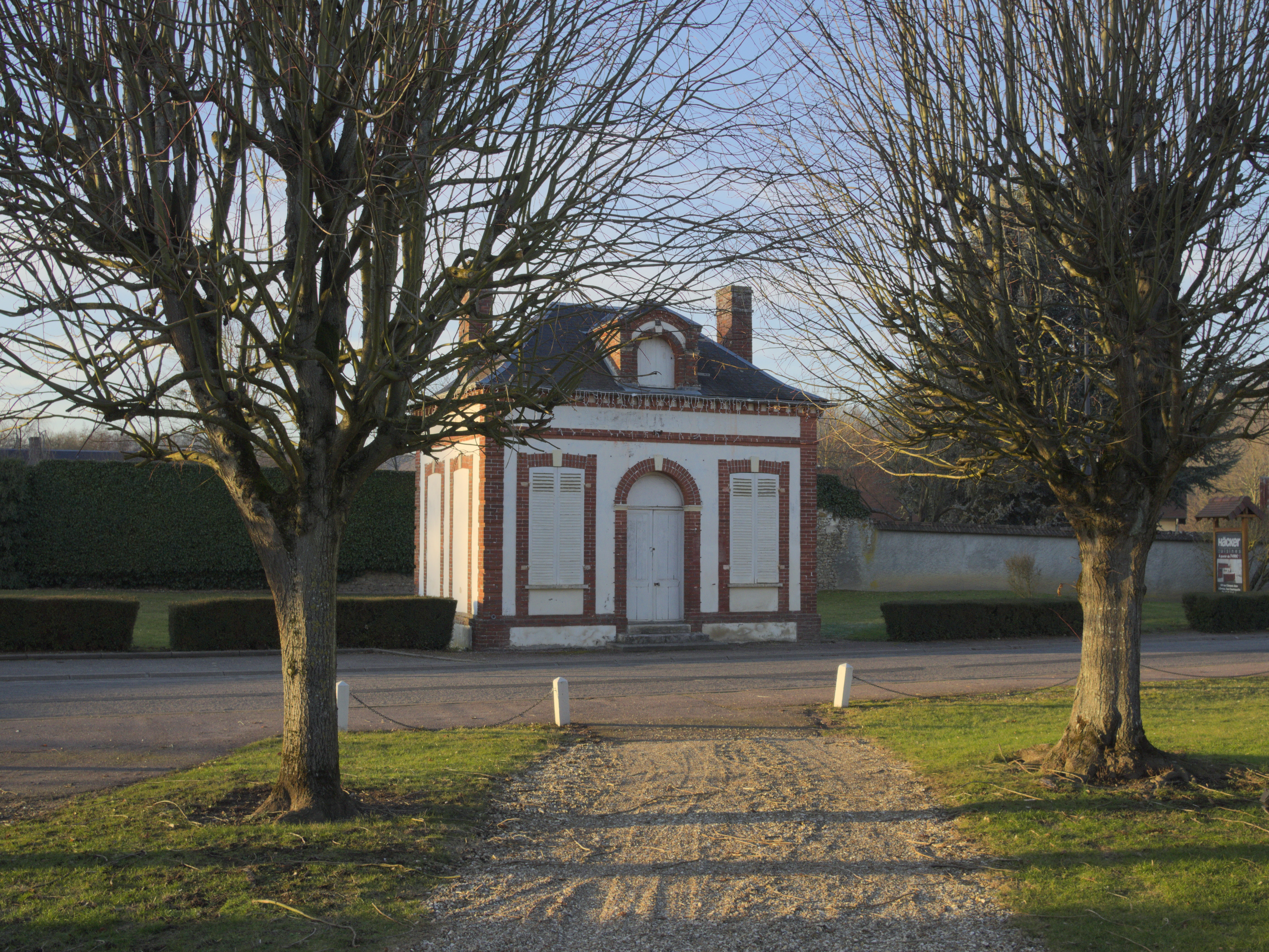 ancienne mairie d'Aulnay sur Iton, vue vers le Nord Ouest